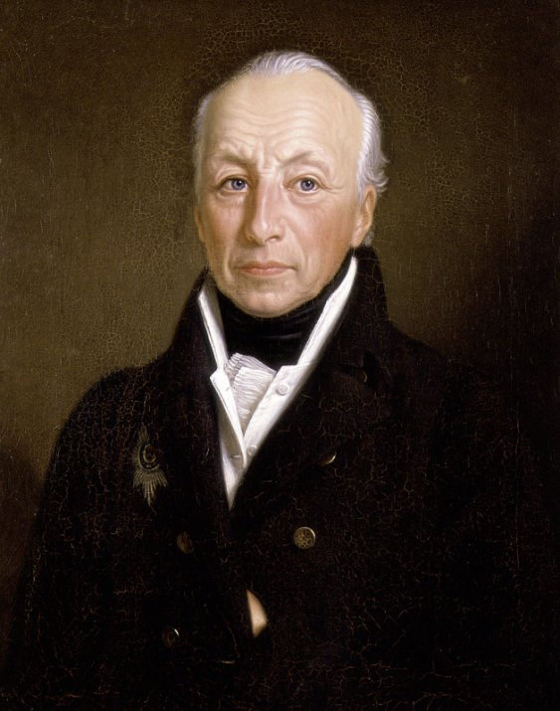 Porträt des Herzogs. Der Regent ist im zivilen Frack dargestellt. Nur der Bruststern des St.-Andreas-Ordens verweist auf seinen hohen Stand